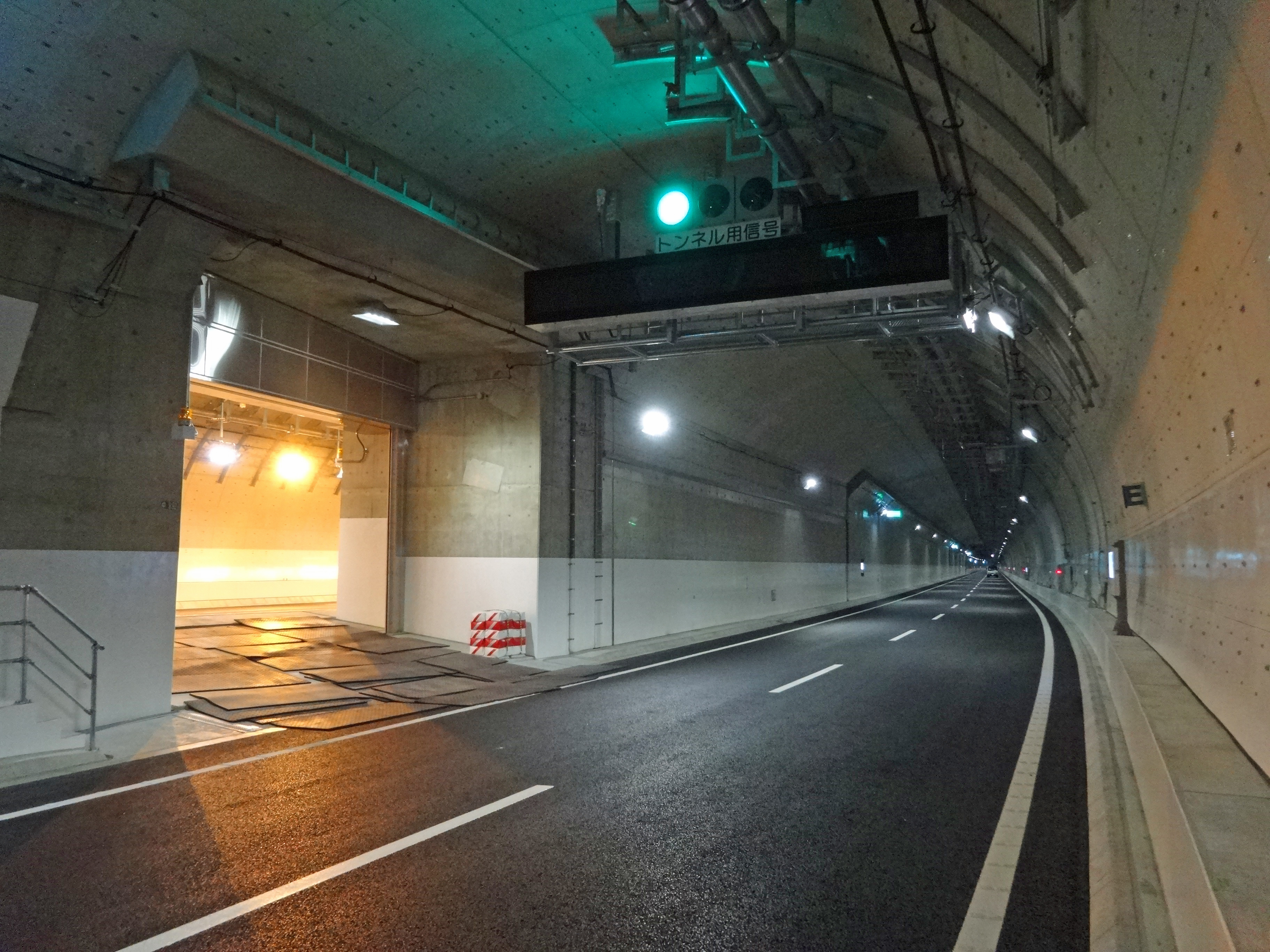 首都高速中央環状線（山手トンネル）大井方面・五反田出入口付近。左にある車両用通路の向こうは渋谷方面 開通前見学ツアーで撮影